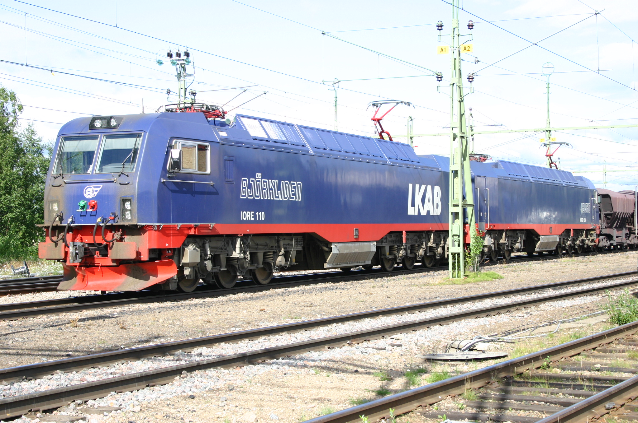 El-Lok IORE 110+109 Gällivare 11.08.04